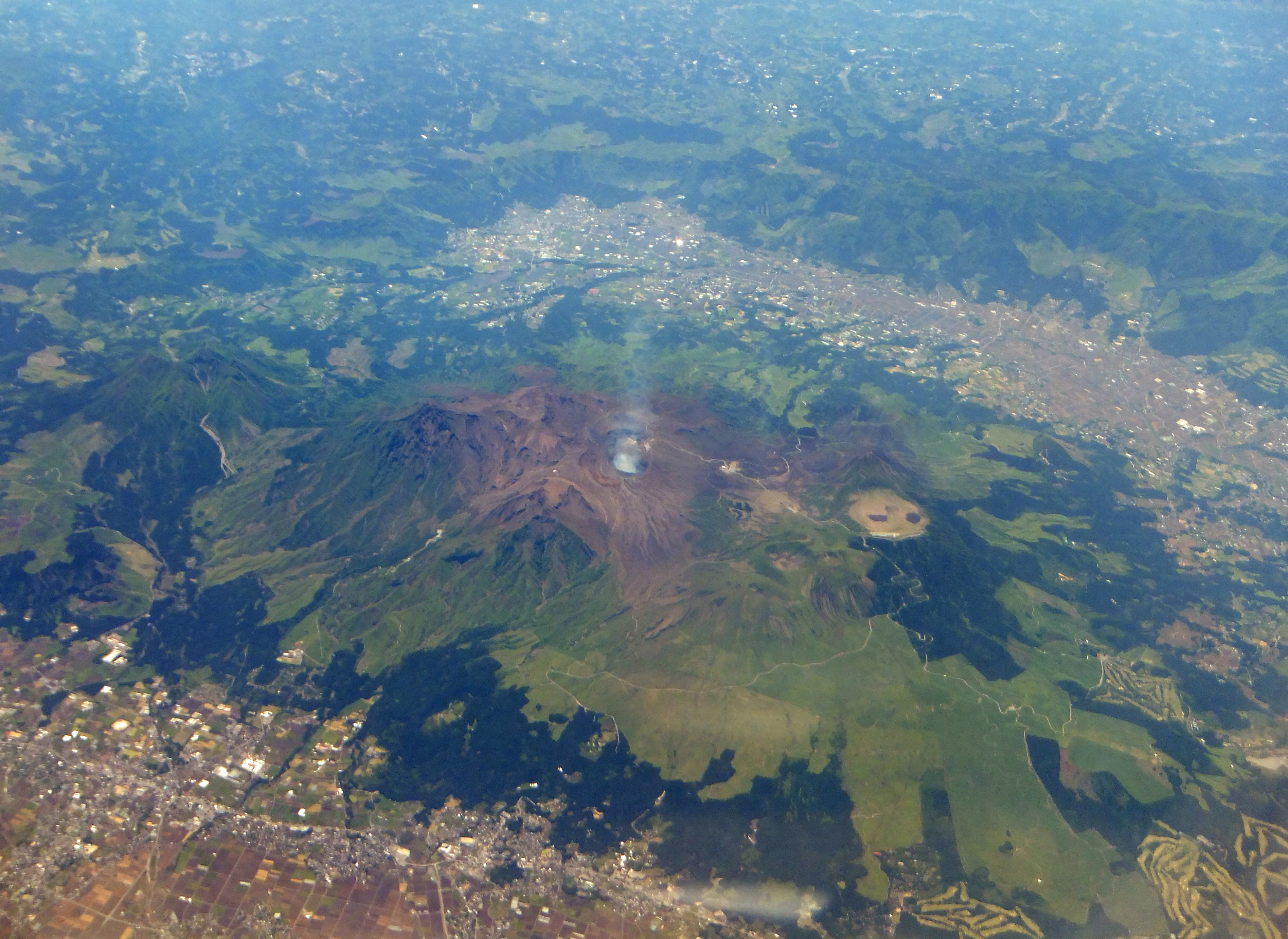 阿蘇山広域空撮画像 阿蘇山広域空撮画像。